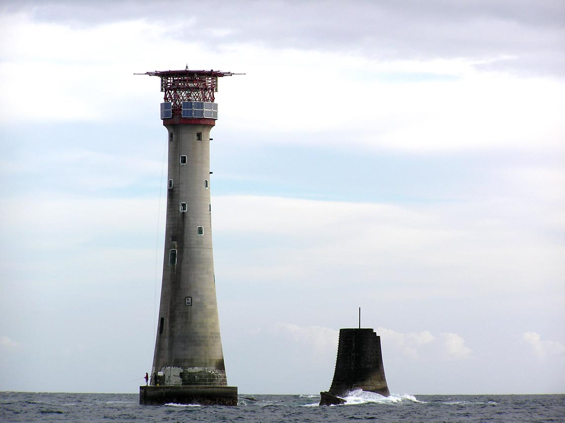 Phare d'Eddystone Rocks au large de Plymouth Lieu : Manche Ouest, 8 Milles au Sud de la baie de Plymouth Date : 2005 Auteur : photo personnelle